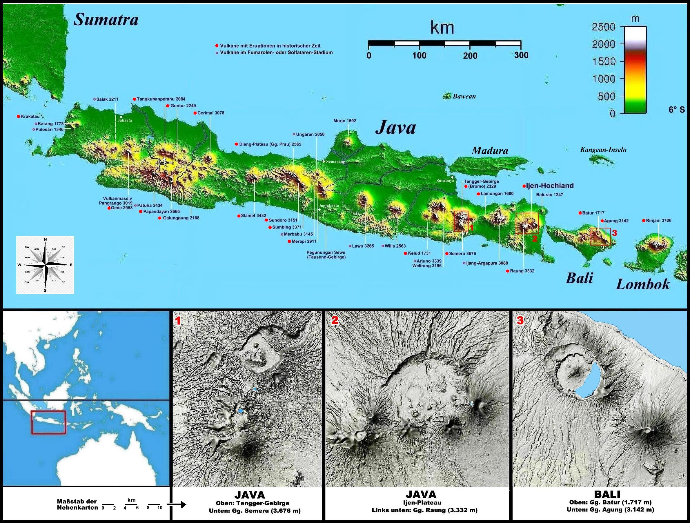 Java - Bali - Lombok. Übersichtskarte der Vulkane